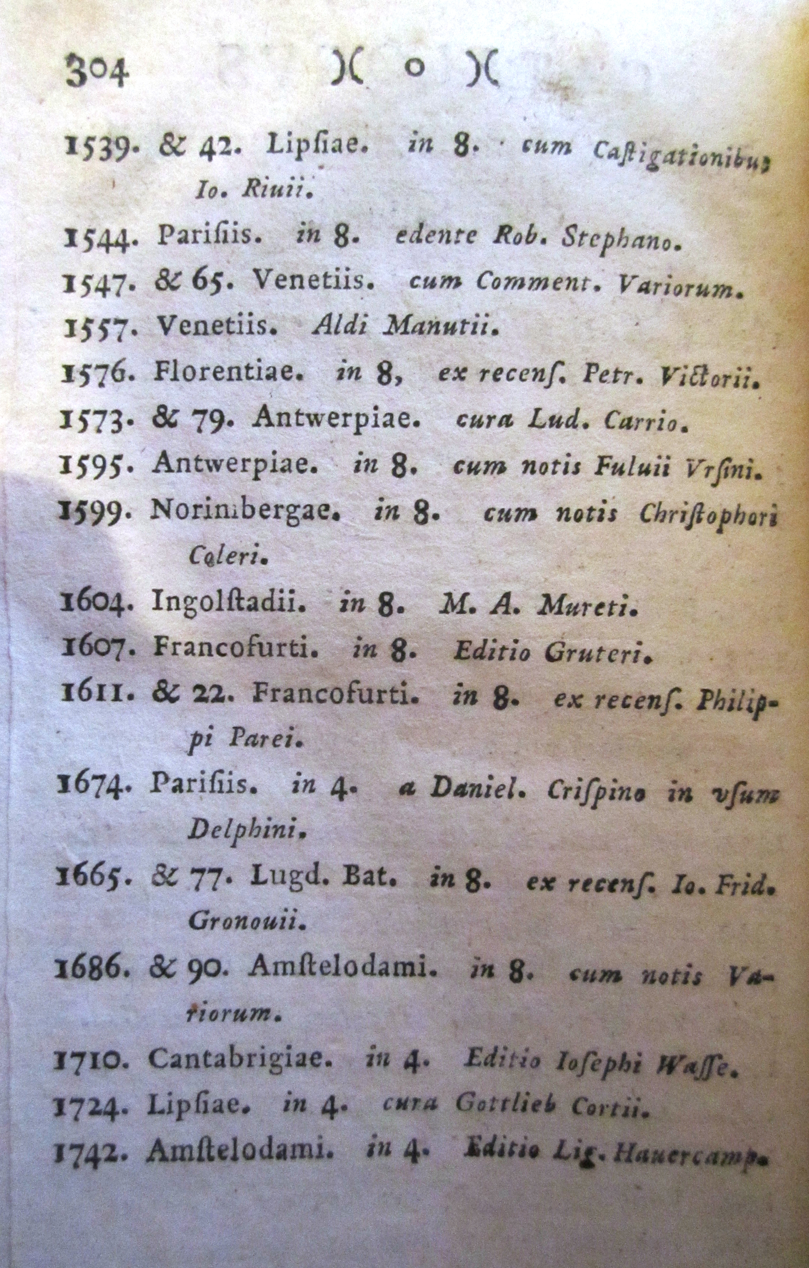 Catalogus praestantiorum editionum Caii Crispi Sallustii 1779